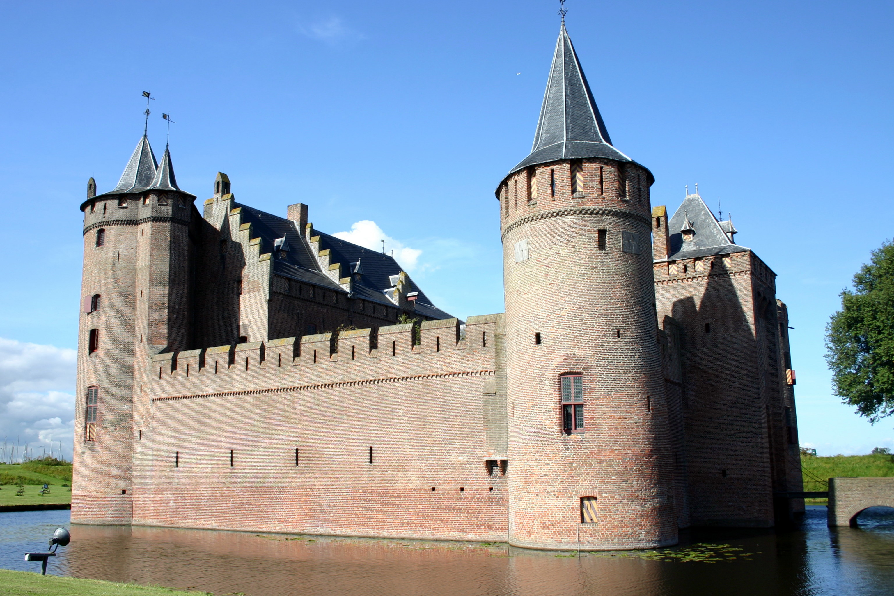 Muiderslot september 2007